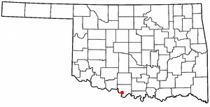 Category:Oklahoma maps